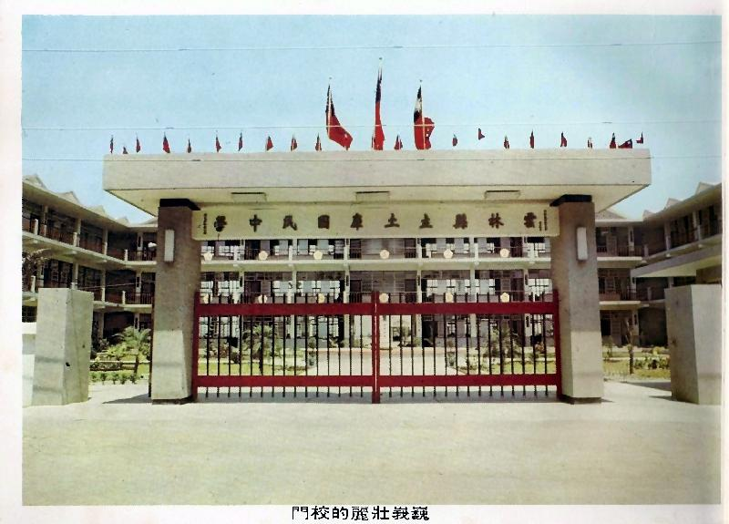 雲林縣立土庫國民中學的校門，取自該校第四屆（1974年6月畢業）畢業紀念冊。